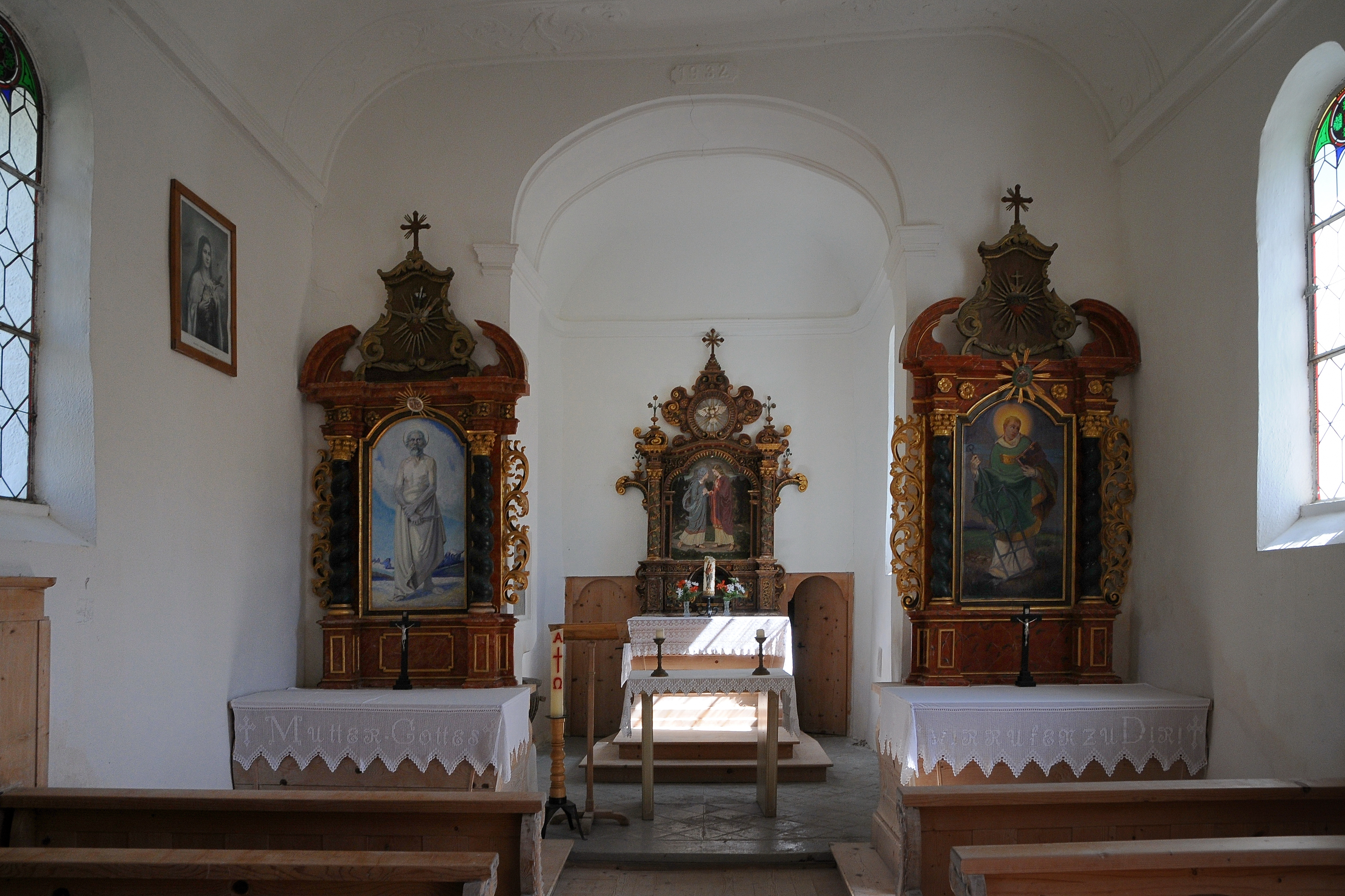 Kath. Pfarrkirche hl. Jakobus in Hochkrumbach bei Warth.